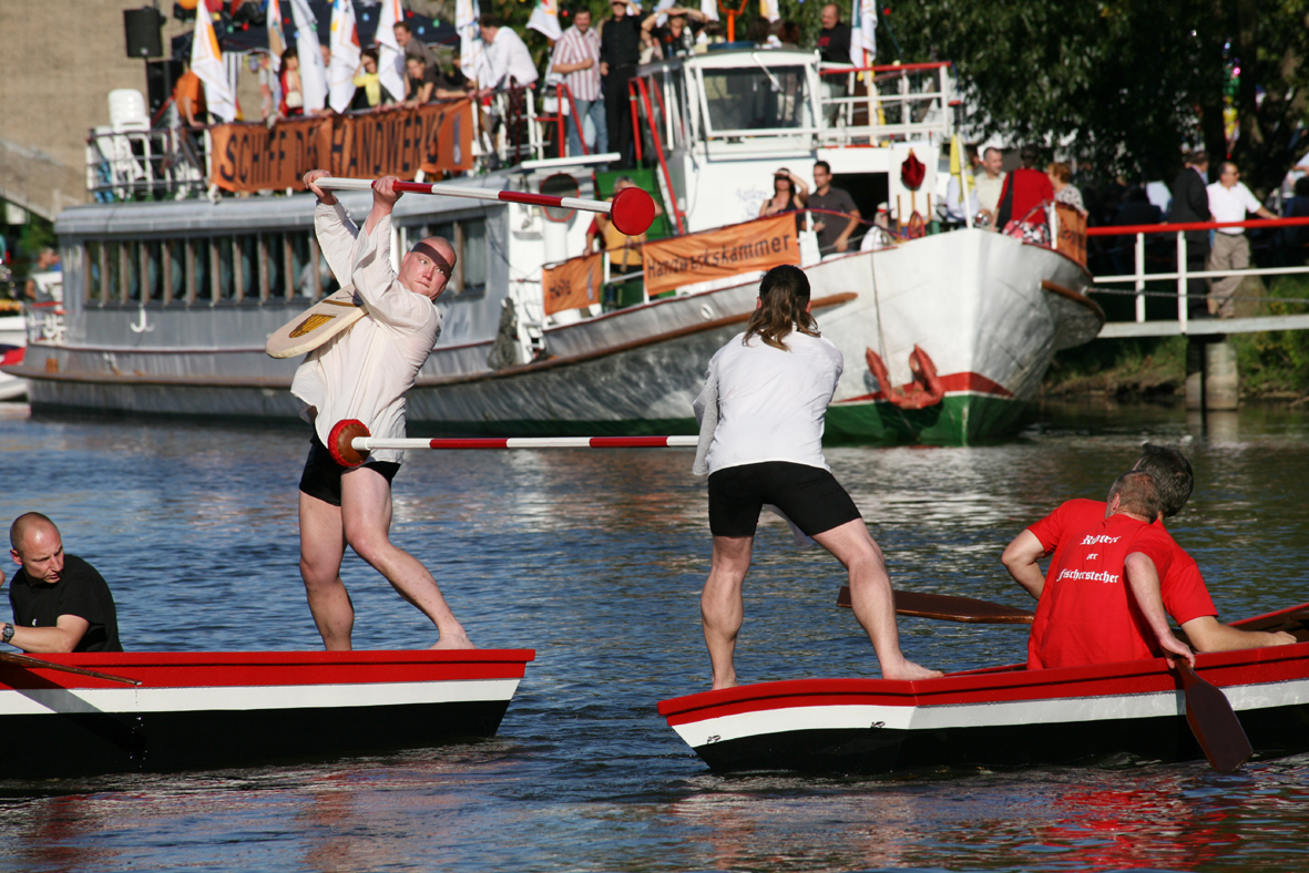 Die Halloren sind über ihr Salzhandwerk von jeher eng mit der Saale verbunden und werfen sich beim Fischerstechen zum Laternenfest gegenseitig in den Fluss als Animation für das schaulustige Publikum